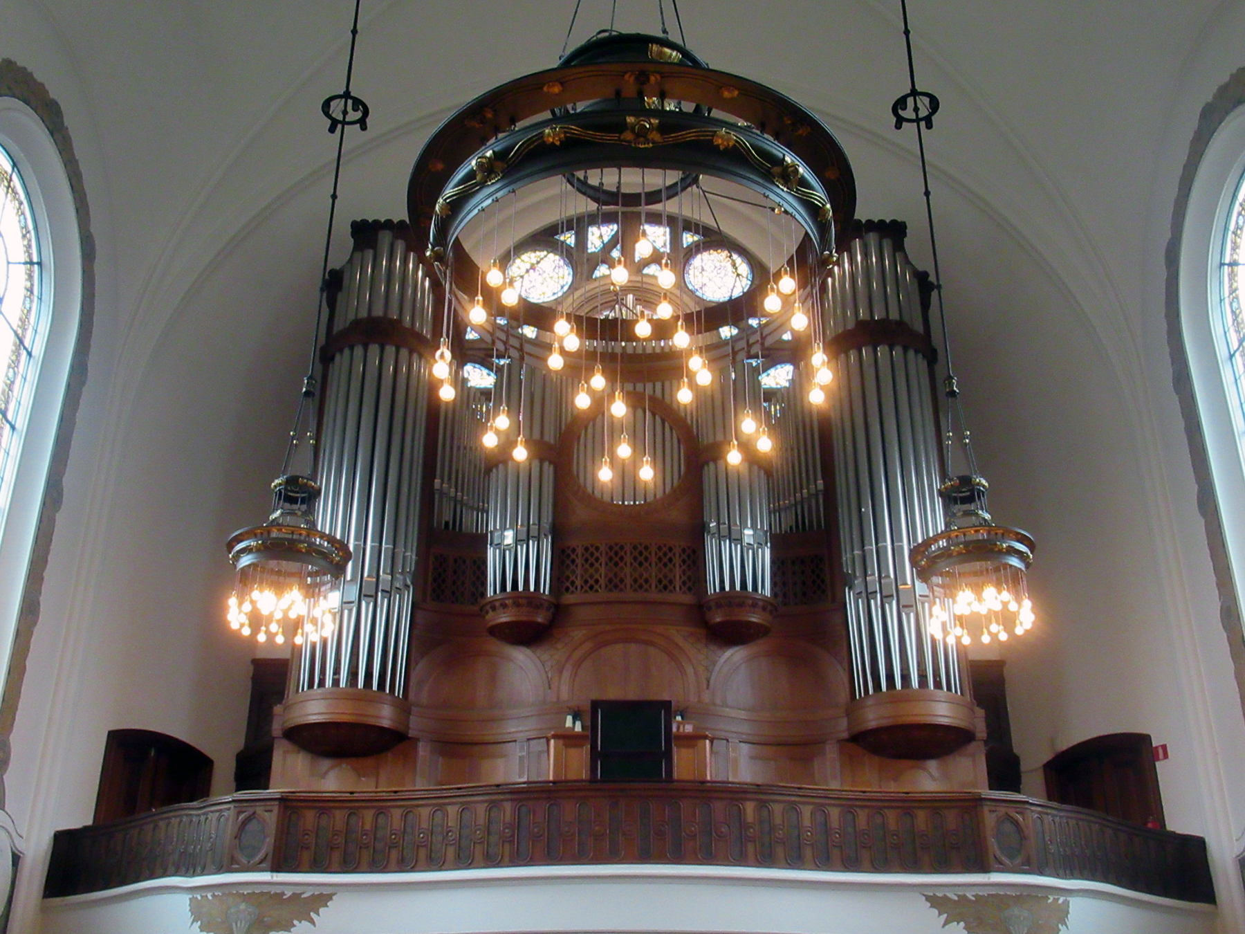 орган в кирхе Святого Иоанна